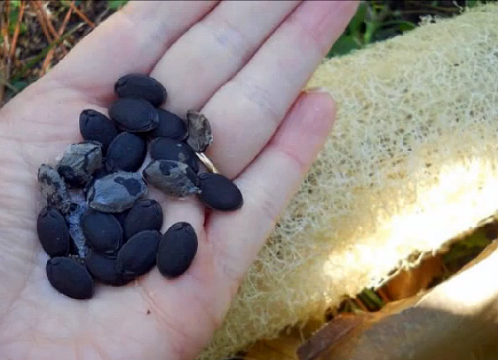 Graines de Luffa aegyptiaca et éponge